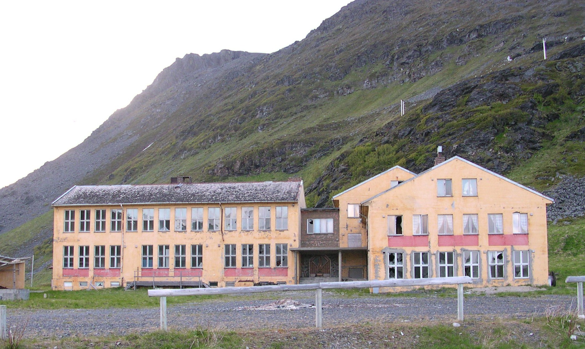 Internatet på Sarnes, Nordkapp kommune, Finnmark